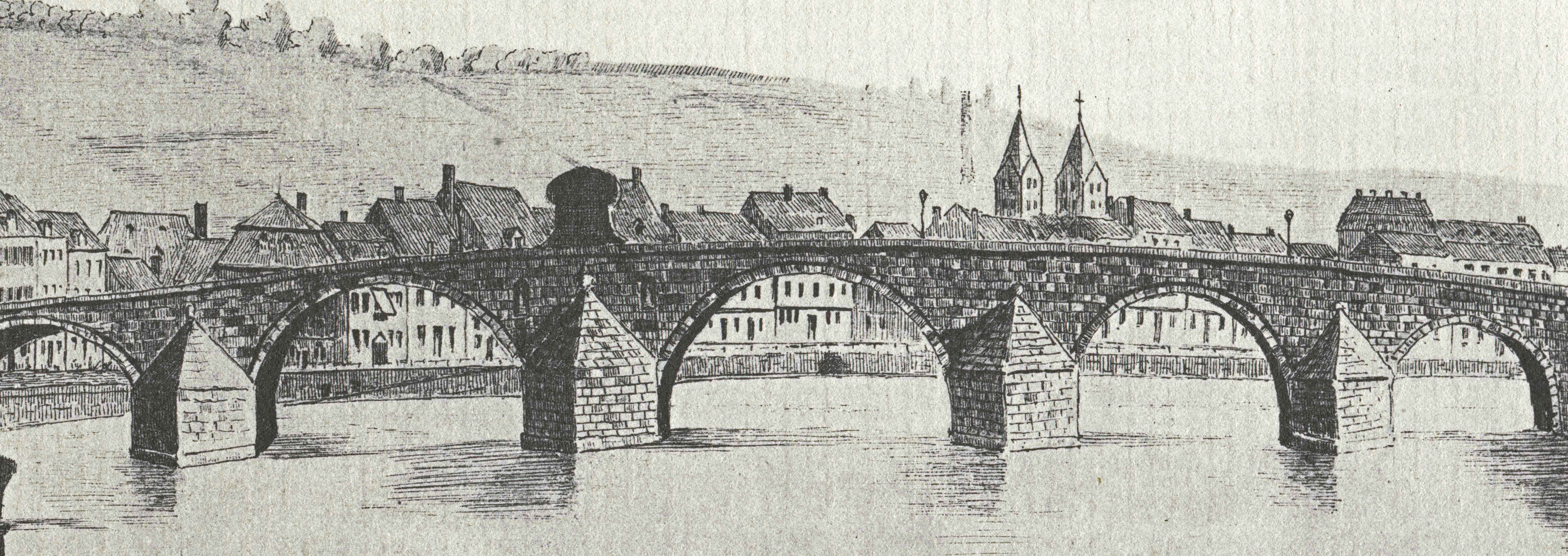 De Pont des Arches 1850. Kategorie:Léck